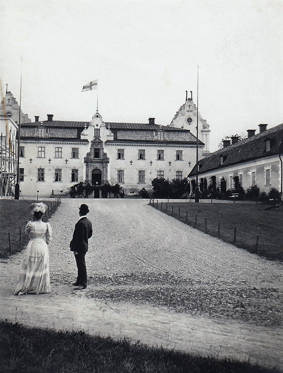 I förgrunden statsrådet Hammarskjöld och okänd kvinna.